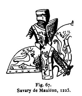 Savary de Mauléon - 1225